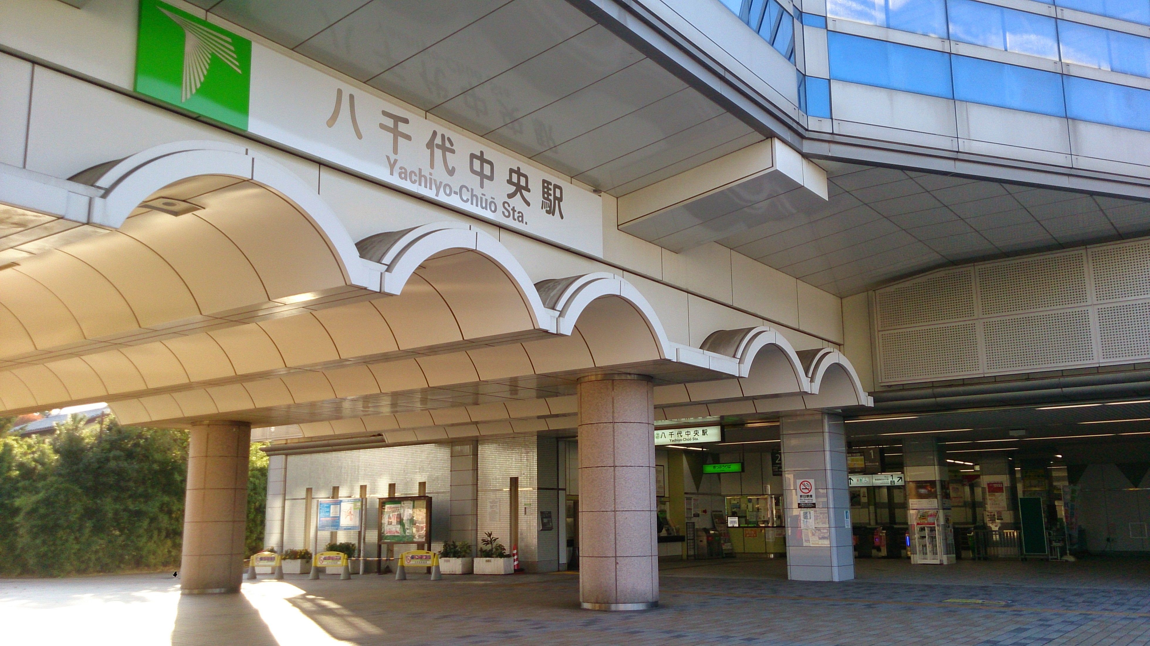 八千代中央駅北口